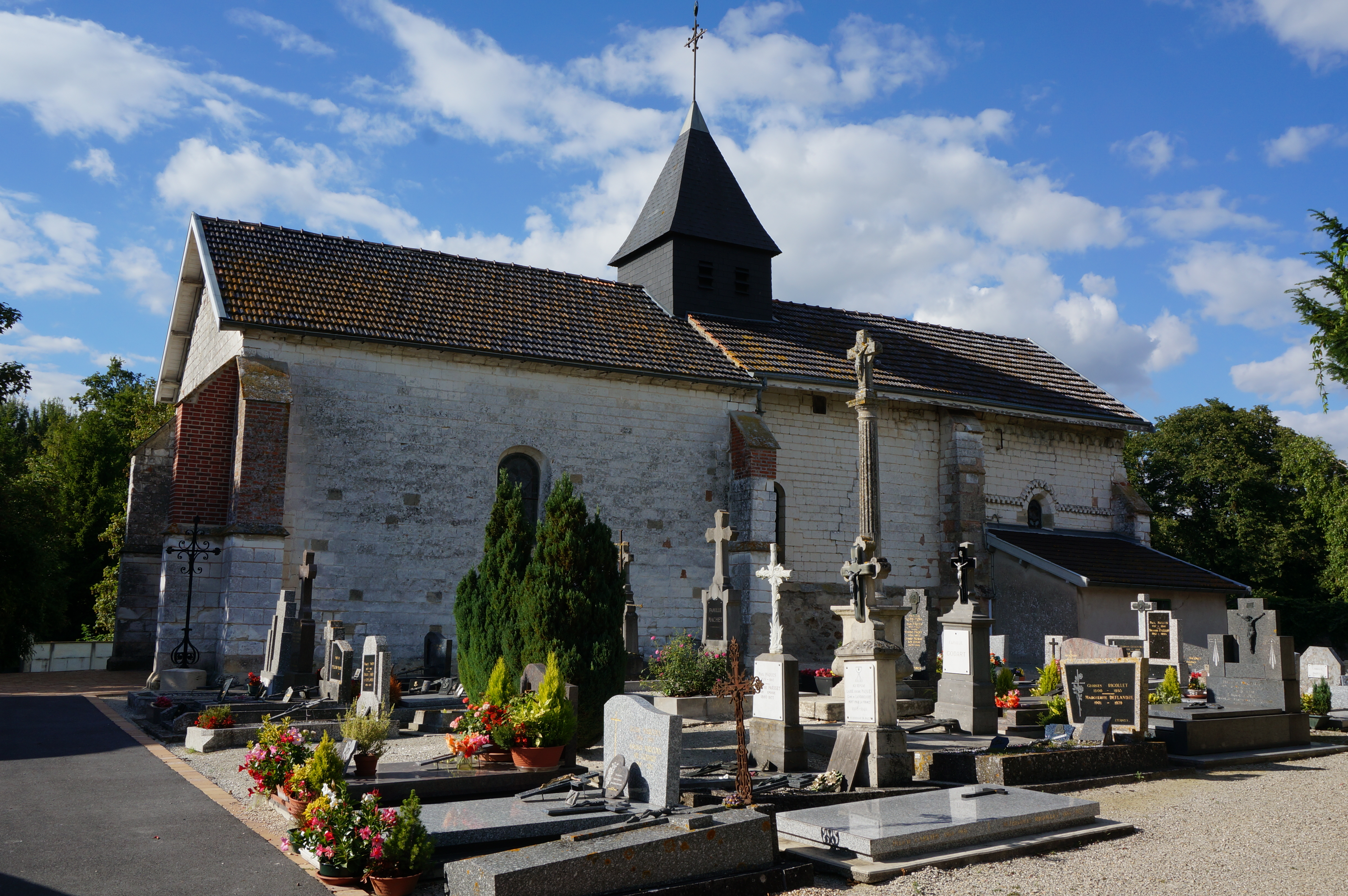 église Saint-Paul de Dampierre-au-Temple.